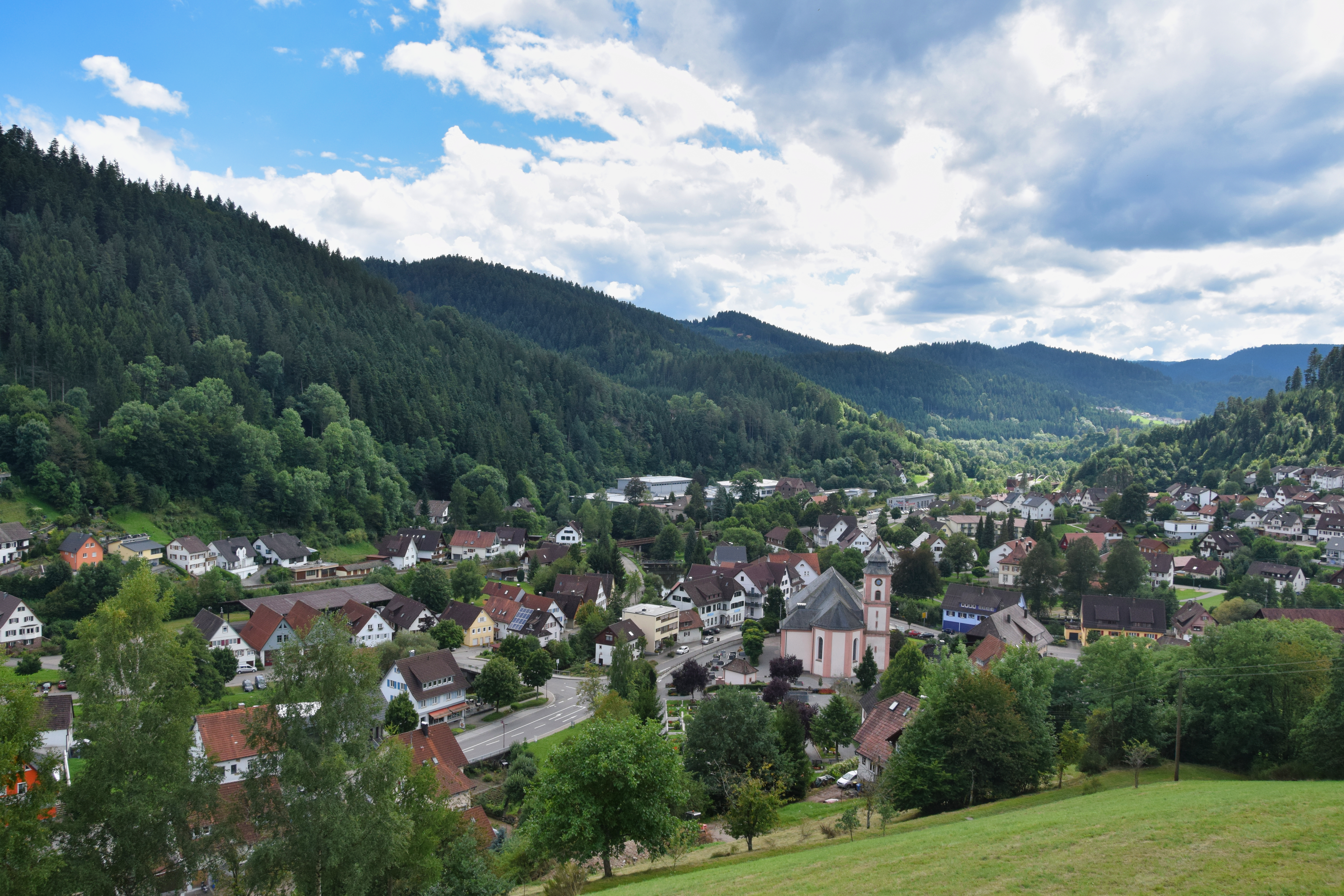 Schenkenzell vom Pfarrberg aus gesehen